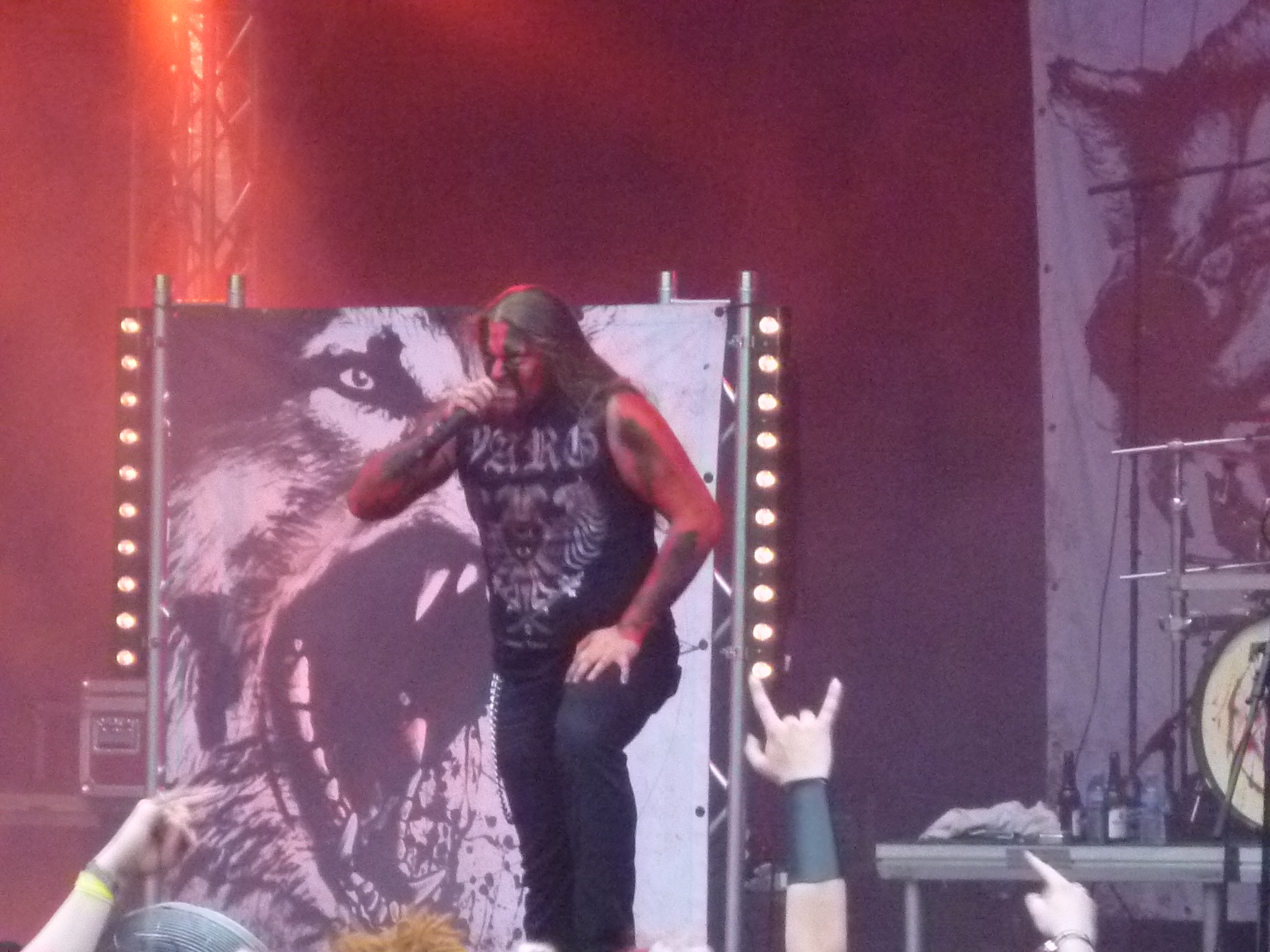 Varg live am 28. April auf dem Hexentanz-Festival 2013